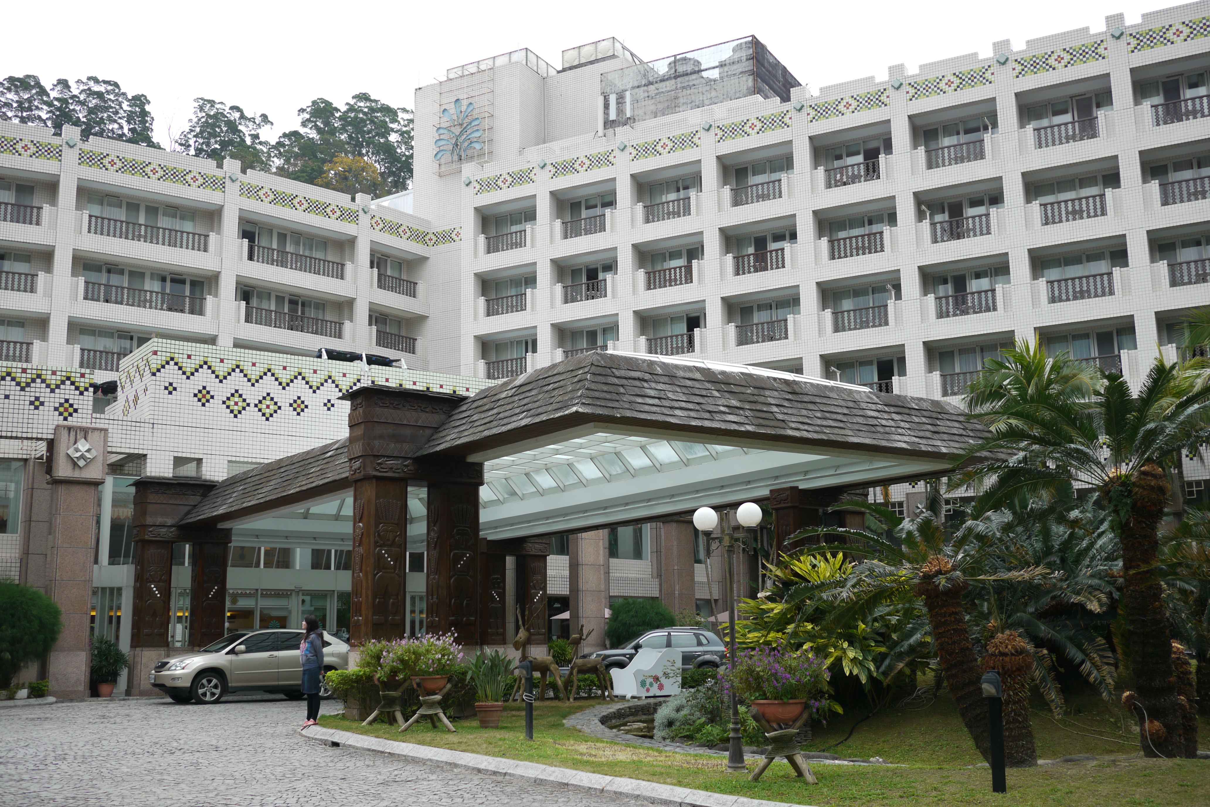 知本老爺大酒店，位於臺東縣卑南鄉溫泉村龍泉路113巷23號。